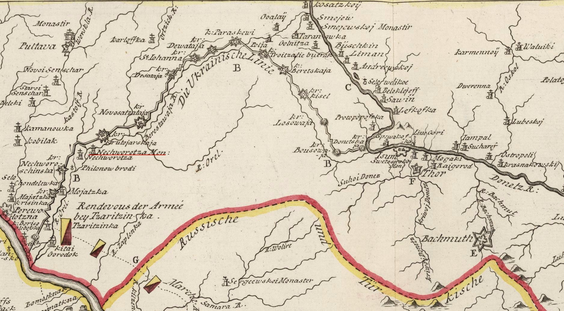 Украинская линия. Фрагмент Карты военных действий 1736 года на Дону и Днепре, составленной Ж. Н. Делилем в 1745 году для Российской Академии наук.